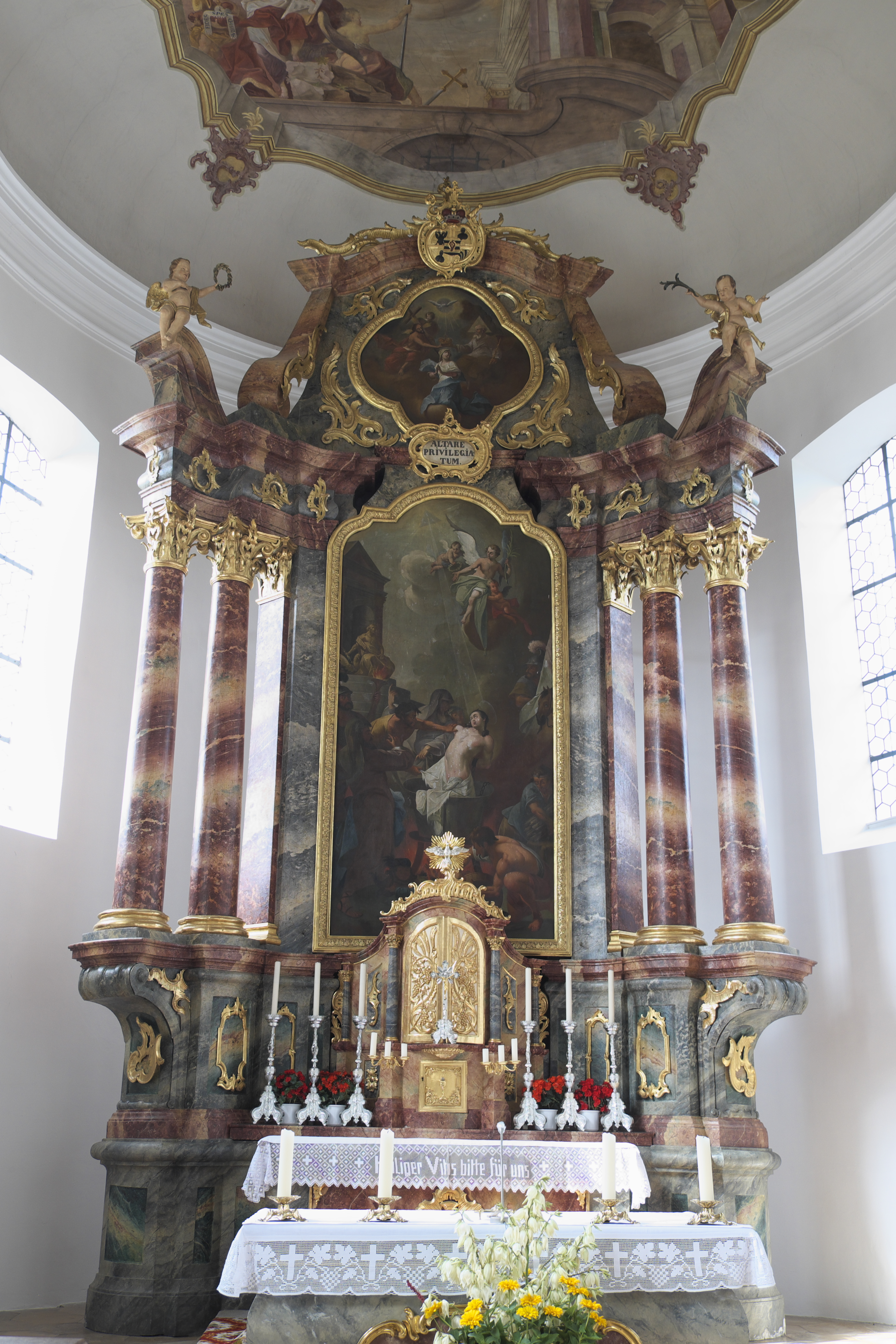 Katholische Pfarrkirche St. Vitus in Kottingwörth (Beilngries) im oberbayerischen Landkreis Eichstätt (Bayern/Deutschland), Hauptaltar von 1768